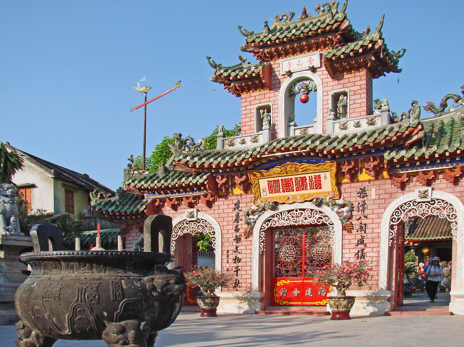 Hội quán Phước Kiến.